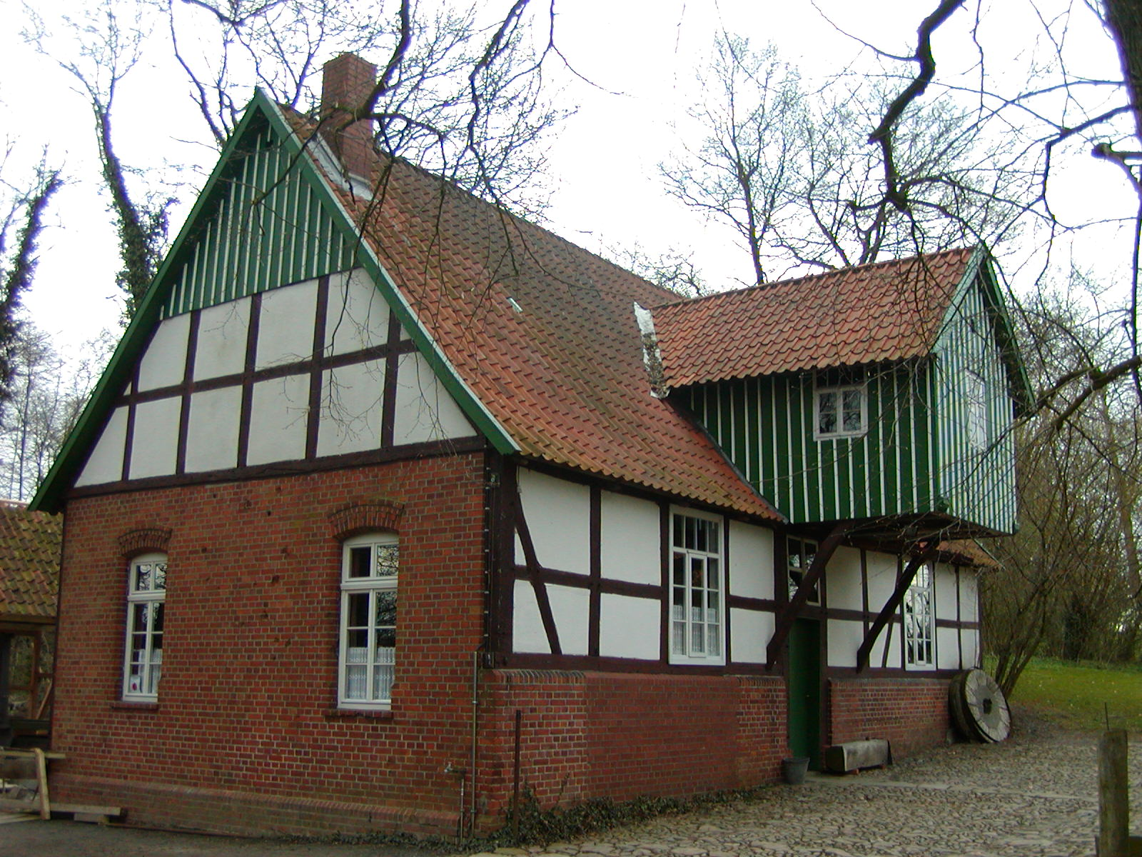 Wassermühle Döhren Sonstiges: ..